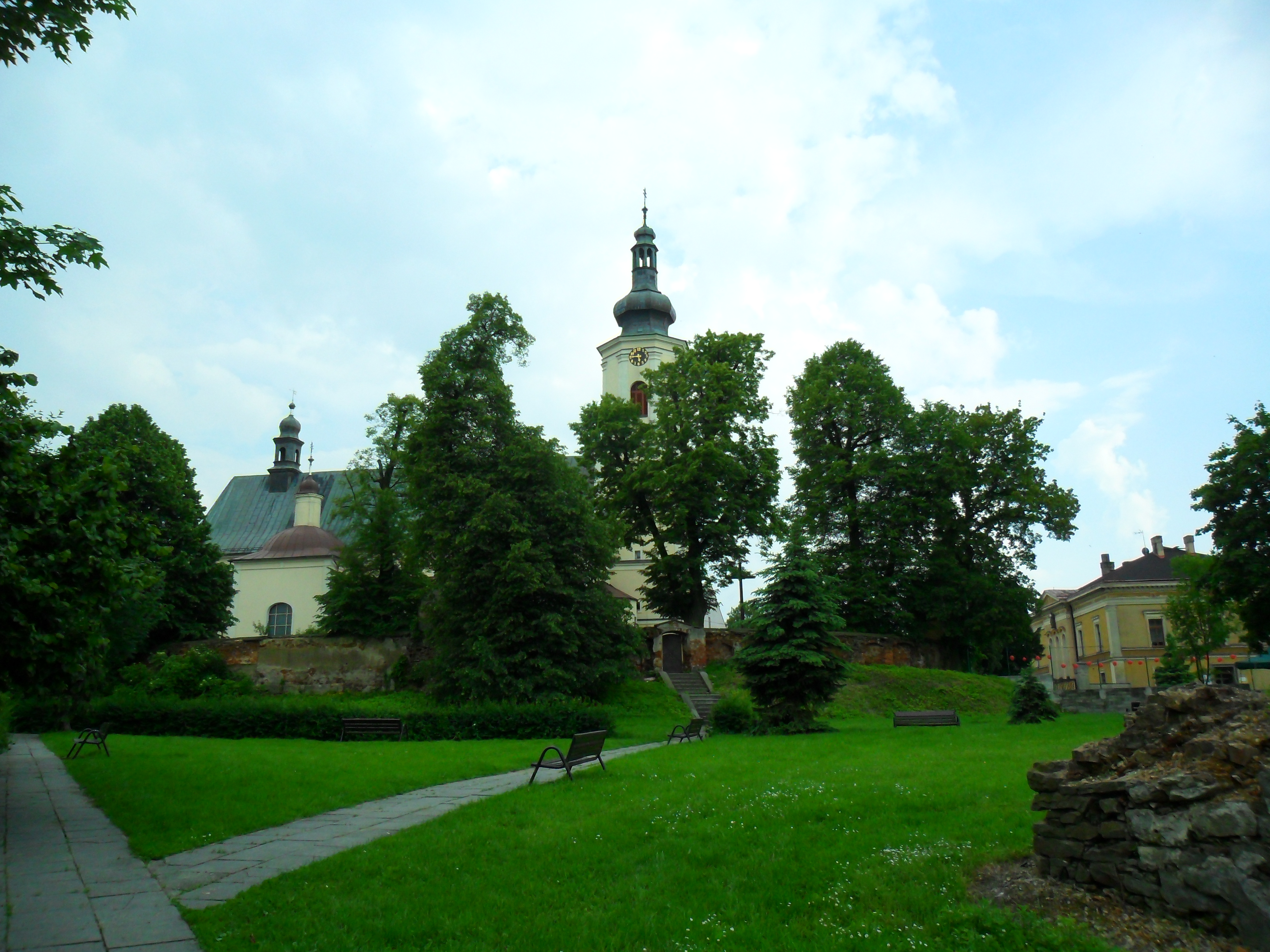 Kościół św. Tomasza Apostoła w Kietrzu